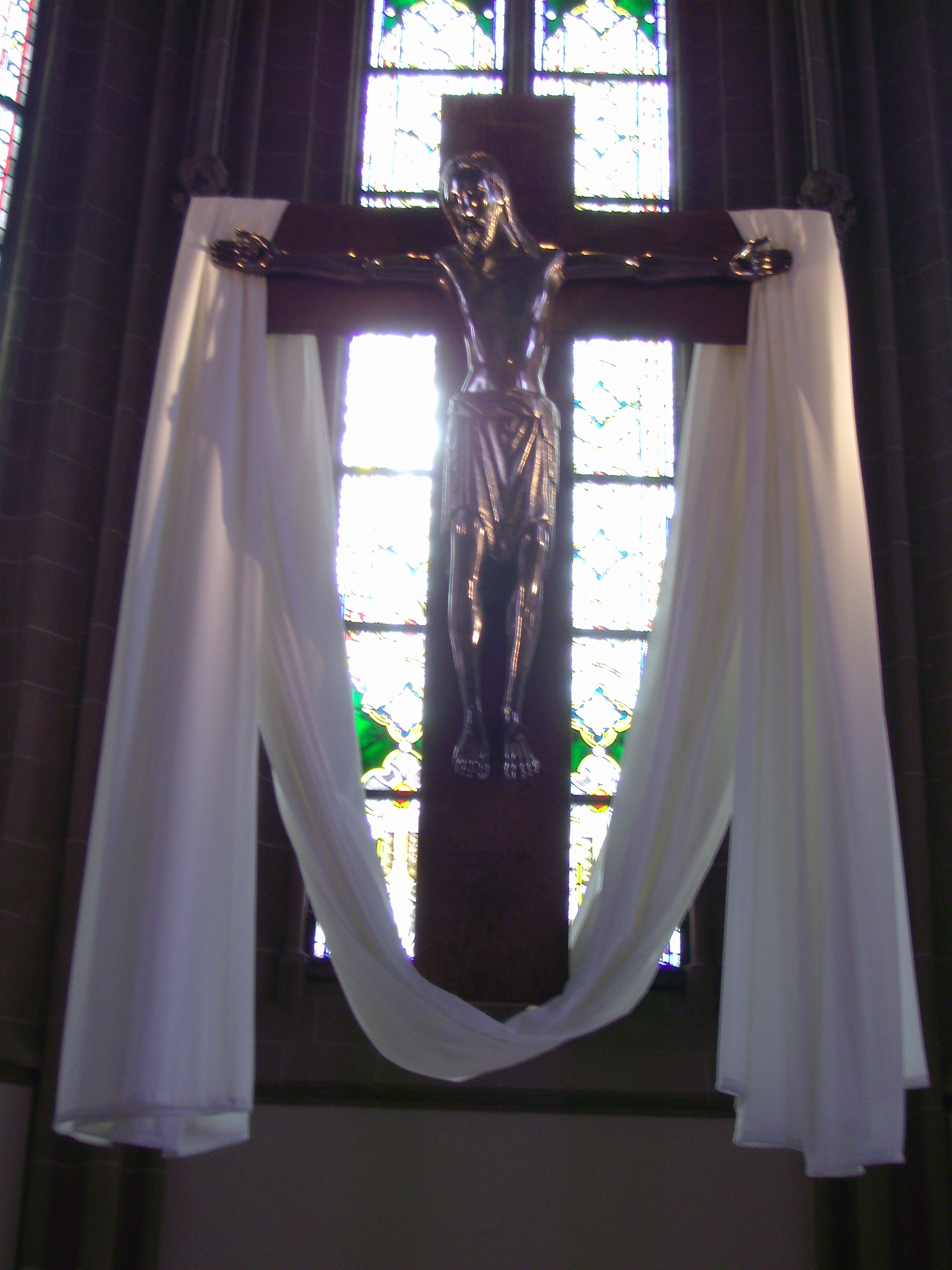 Das Kreuz von Stromberg